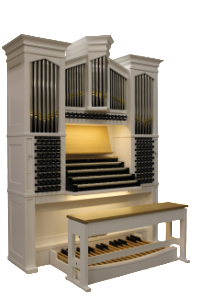 Een Hauptwerkorgel op maat ontwikkeld door Orgelmakerij Noorlander